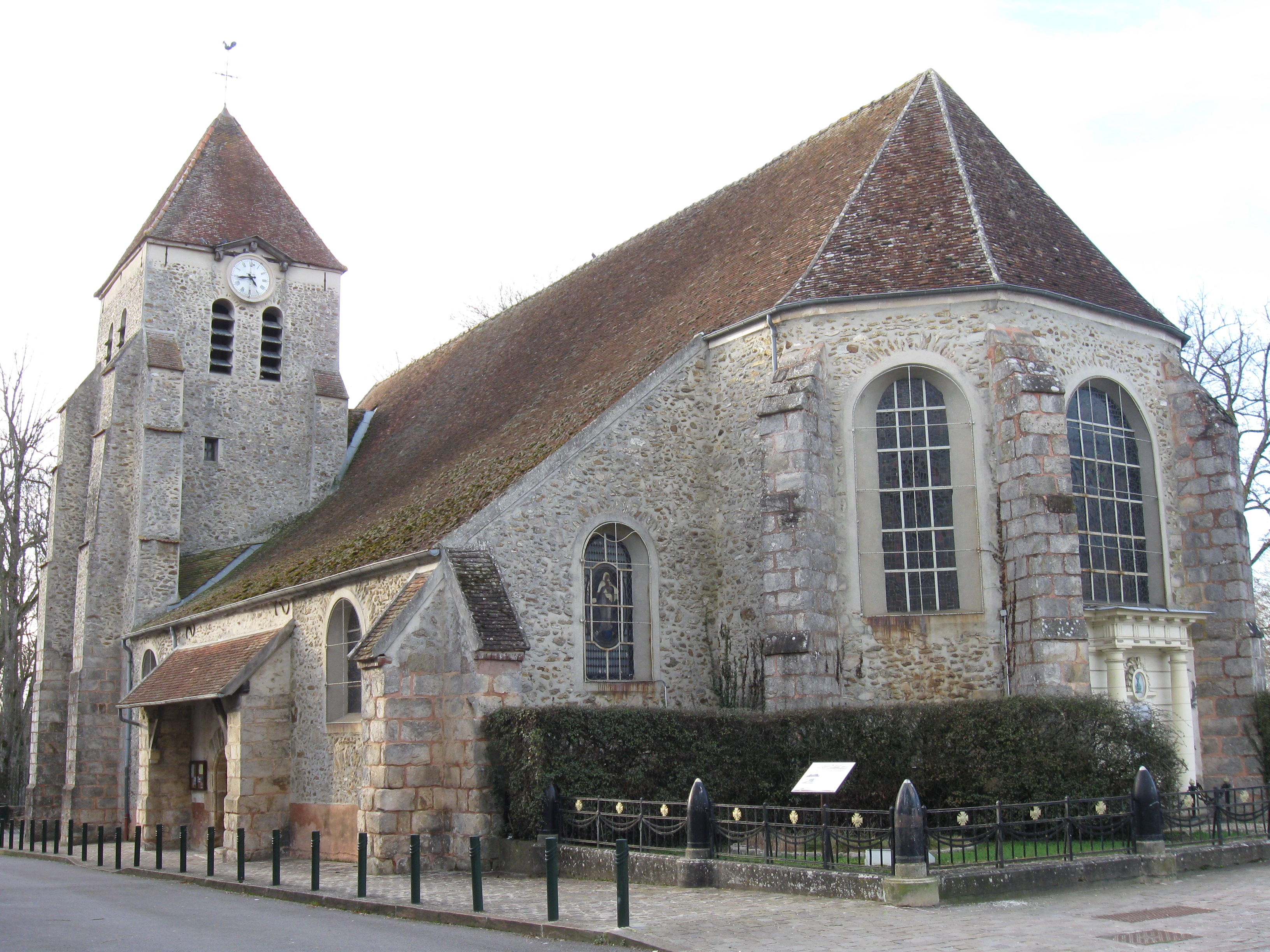 L'église Saint-Pierre-Saint-Nicolas de Mortcerf. (Seine-et-Marne, région Île-de-France).